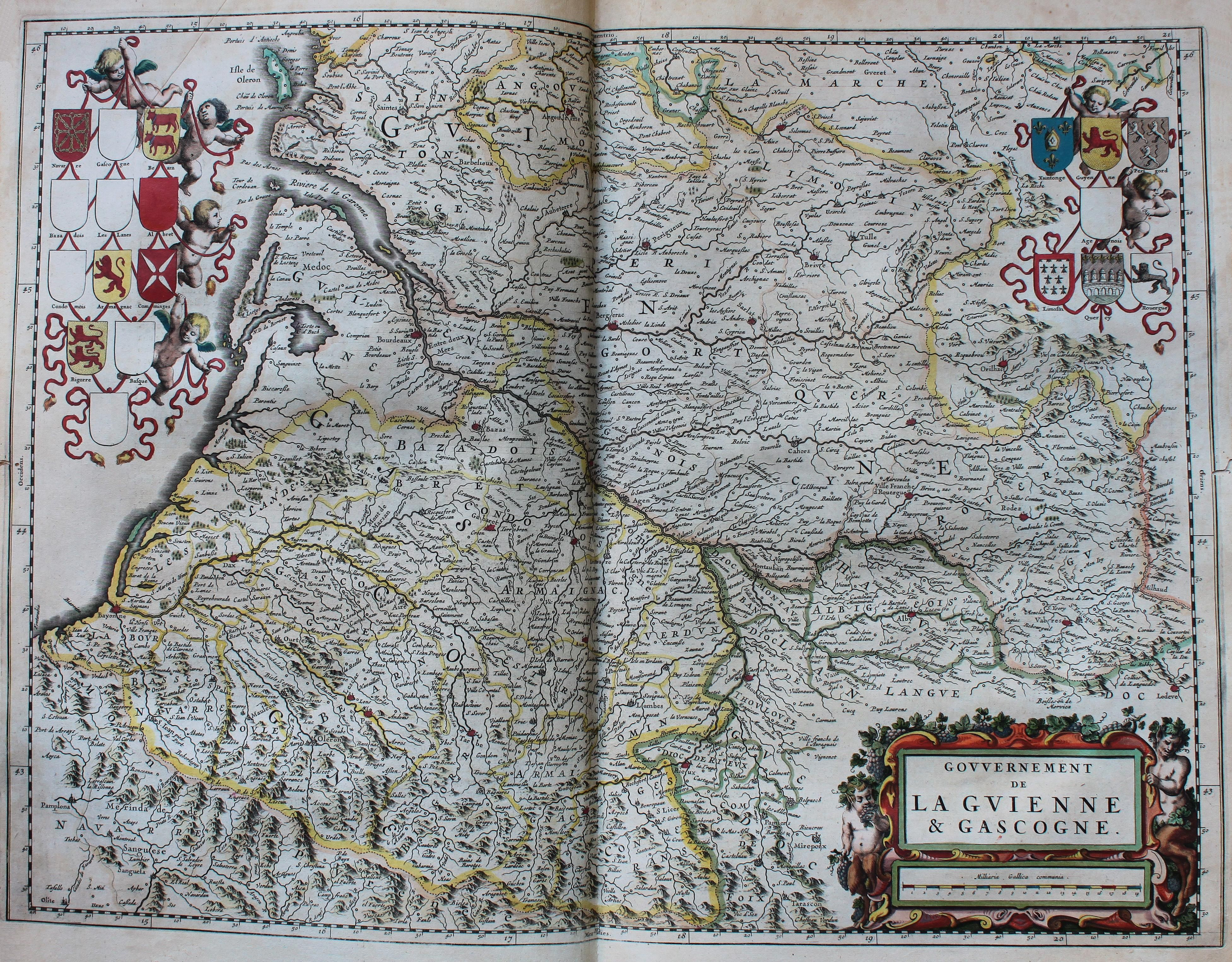 Descripción bibliográfica: Geographia Blaviana. - [Amsterdam : Juan Blaeu, 1659] . - [32], VI, 96 p., 34 f., h. 35a, 35b, 35c, 35d, 36-44 f., 34, [2], 36-40, [2], 43-70 [i. e. 75], [1] f., [20] p. de map., [9] f. de map., [4] f. pleg. de map., [2] f. de plan., [2] f. ge grab. : |bil. ; |cFol. marca major (57 cm.) . - En la dedicatoria a Felipe IV: "Presenta ... El Atlas Universal y Cosmographico de los orbes y terrestre ... Juan Blaeu" . - Título tomado del frontispicio. -- Privilegio fechado en 1659. -Errores de pag. - Sign.: 1, *2, **3, ***-****2, a-e2, A-I2, K1, L-Z2, Aa-Dd2, 4 2, Ee-Ff2, A-I2, K1, L2, M1, N-Y2, Z5, Aa-Dd2, Ee1, A-D2, E-F1, G-I2, K-L1, M-O2, P1, Q-Z2, Aa-Bb2, Cc1, Dd3, Ff-Zz2, Aaa-Bbb2, . - Frontispicio grab. col. -- Incluye un total de 49 il. entre map., plan. i grab. Materia: Atlas - Obras anteriores a 1800 Impresor: Blaeu, Joan, 1596-1673, imp. Lugar de impresión: Holanda. Amsterdam Localización: Vea la ilustración en su contexto Visite también la exposición "Cartografía histórica en la Biblioteca de la Universidad de Sevilla"